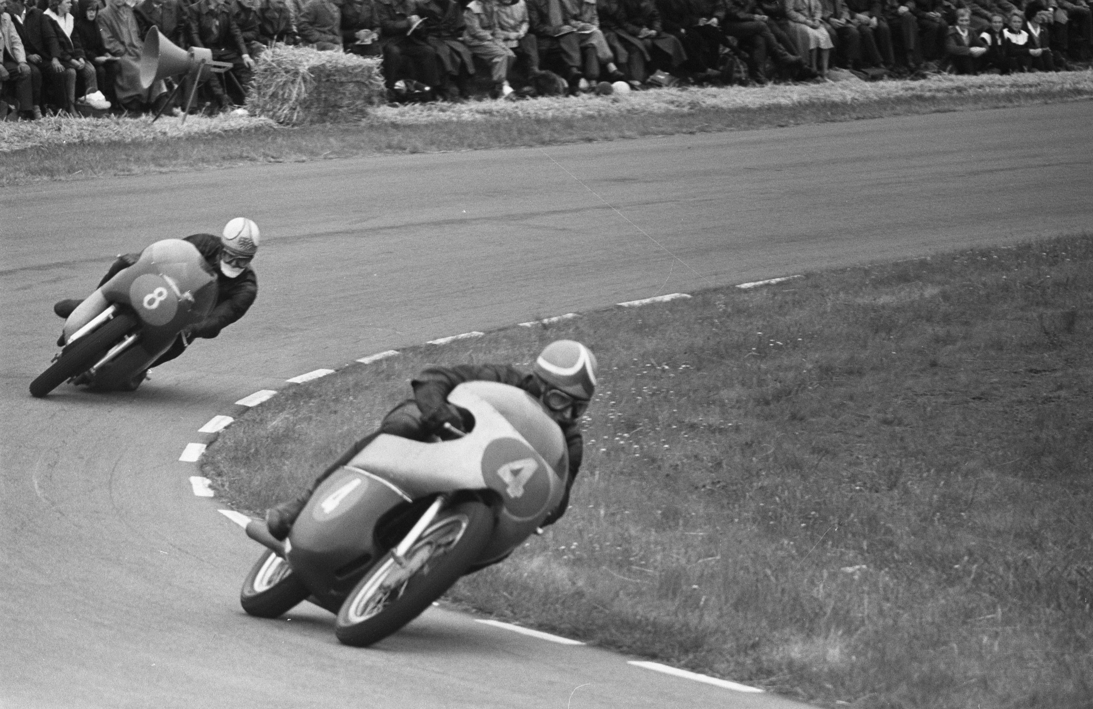 Collectie / Archief : Fotocollectie Anefo Reportage / Serie : TT Assen 1962 Beschrijving : TT-races in Assen Datum : 1 juli 1962 Locatie : Assen Trefwoorden : motorsport Instellingsnaam : TT Fotograaf : Bilsen, Joop van / Anefo Auteursrechthebbende : Nationaal Archief Materiaalsoort : Negatief (zwart/wit) Nummer archiefinventaris : bekijk toegang 2.24.01.05 Bestanddeelnummer : 914-0834